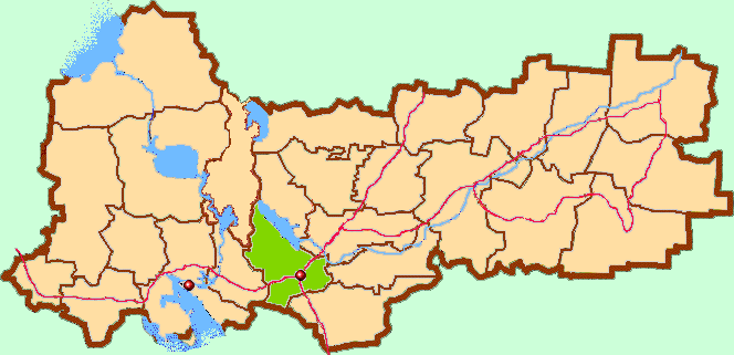 Vologda Oblast map by Al Silonov